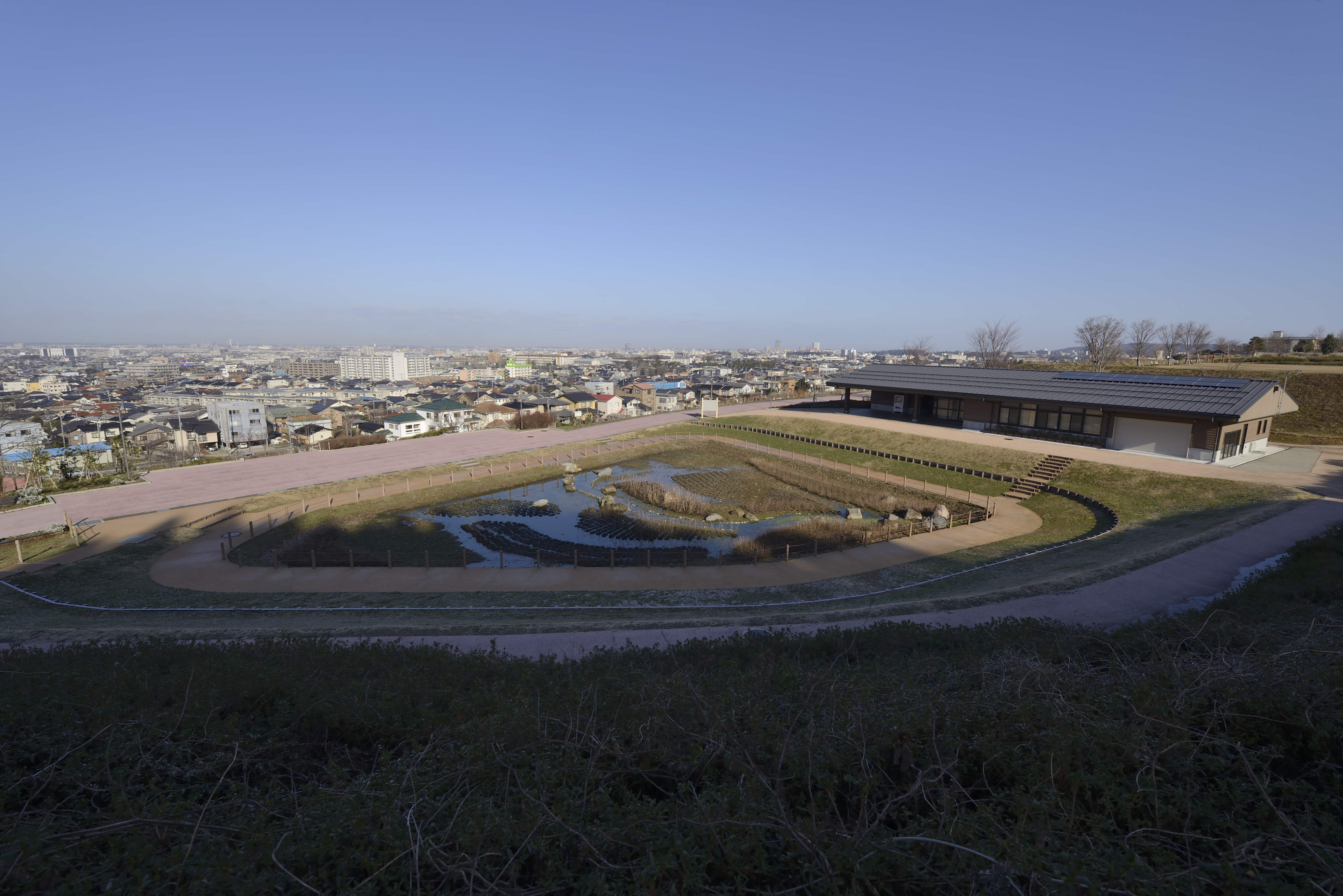 大乗寺丘陵公園